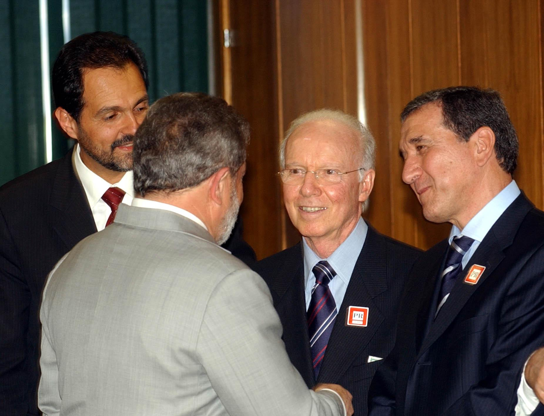 Brasília - O presidente Luiz Inácio Lula da Silva, e o ministro dos Esportes, Agnelo Queirós, com os treinadores da Seleção Brasileira, Mário Jorge Zagallo e Carlos Alberto Parreira, no Palácio do Planalto.